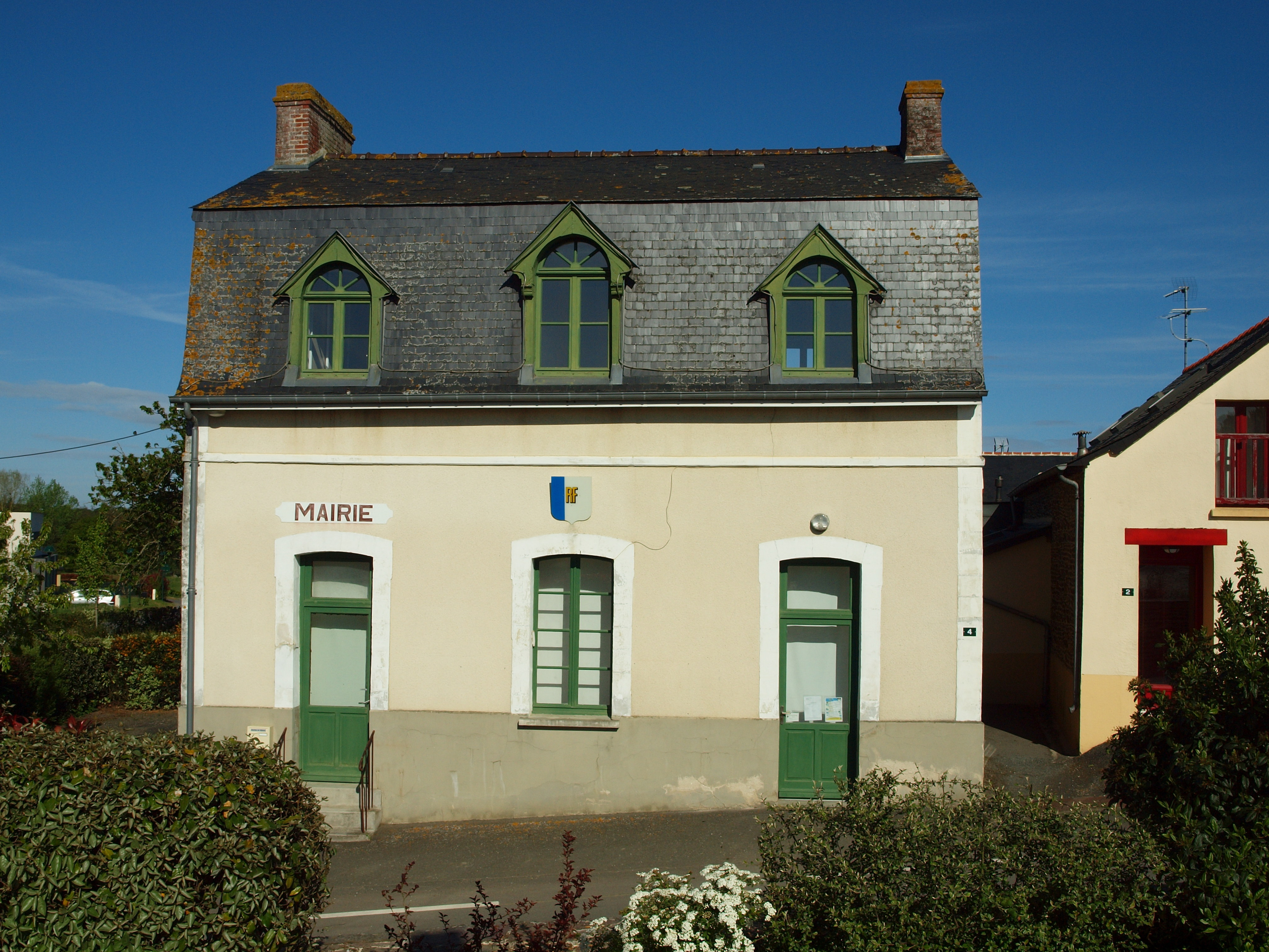 Moussé (Ille-et-Vilaine, France)